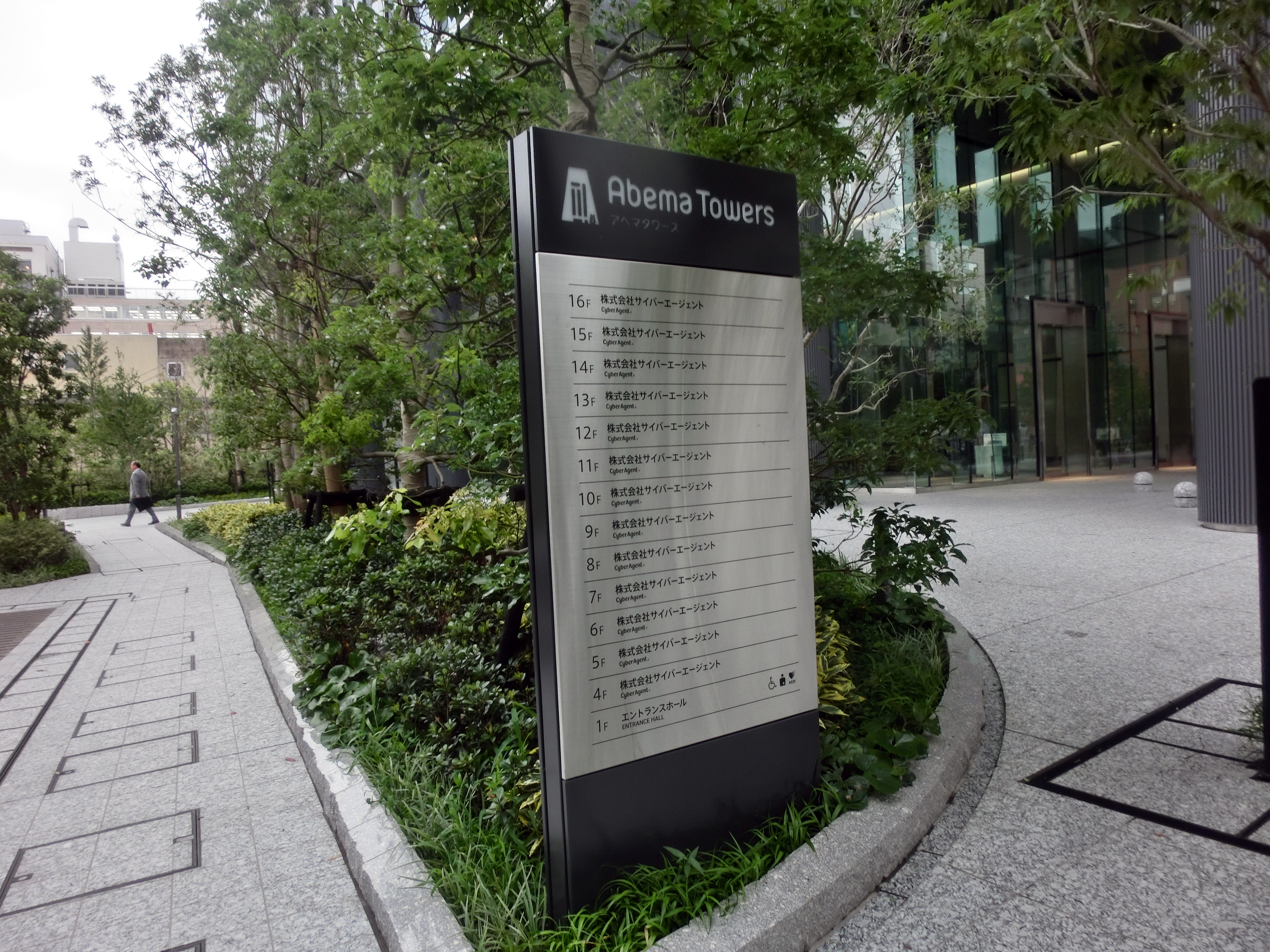 SHIBUYA ABEMAタワーズ